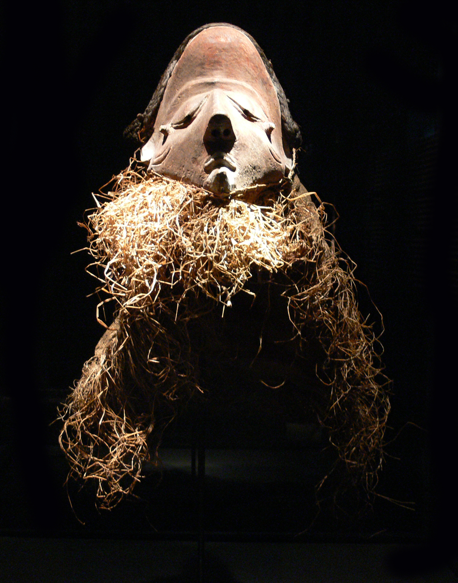 Maske pota oder ginjinga, Demokratische Republik Kongo (Djuma), Pende, 19. Jahrhundert; Holz mit Bemalung, Raphiastoff, Bastfasern. Ethnologisches Museum, Berlin-Dahlem (Sammlung Leo Frobenius, erworben 1904), III C 19538.